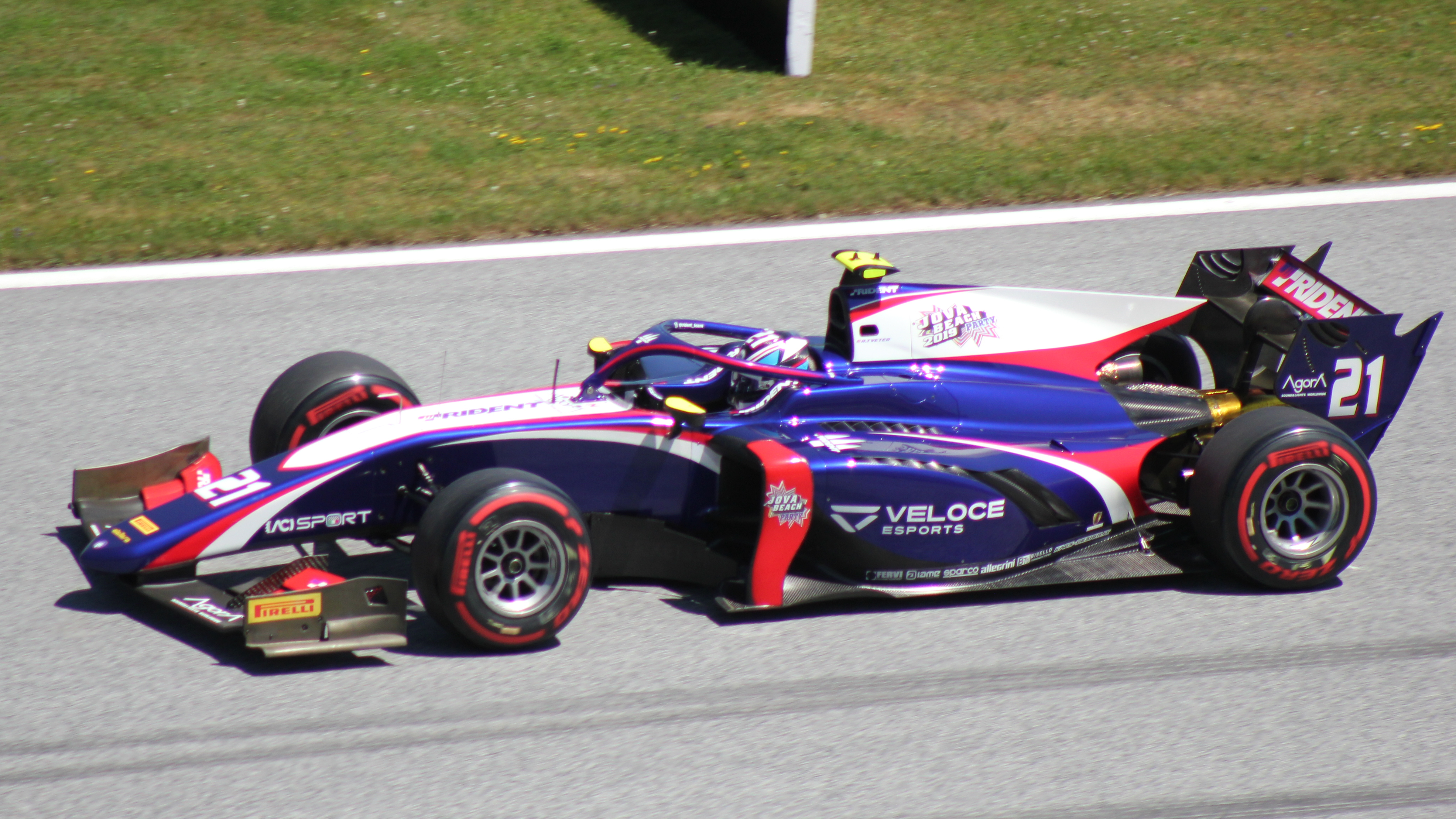 Tveter beim Rennwochenende in Österreich 2019